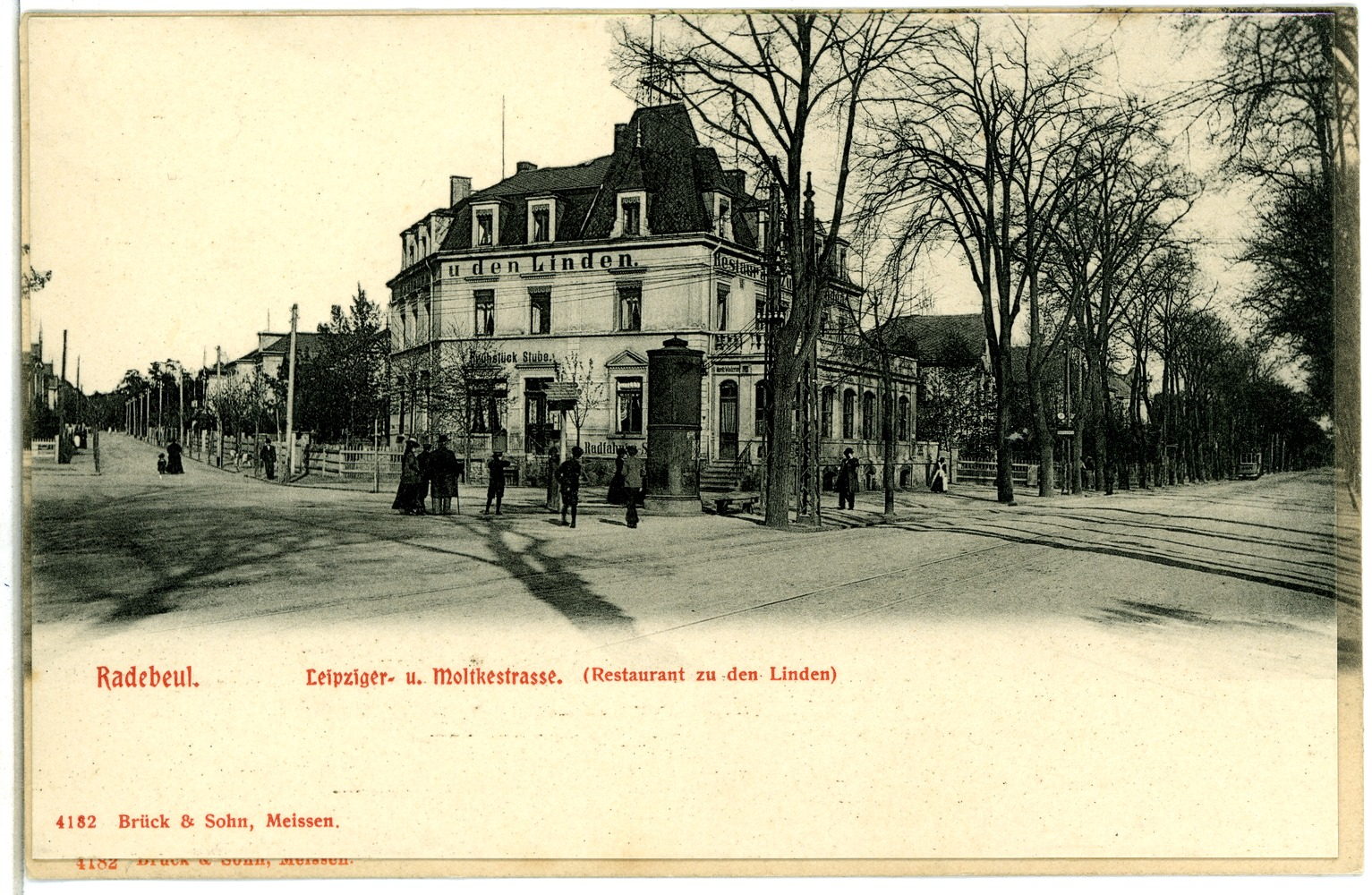 Radebeul; Leipziger und Moltkestraße, Restaurant zu den Linden This postcard is from publisher Brück & Sohn in Meißen ( postcard has a unique number 04182 and is available in a higher resolution at the publisher. This images was uploaded in a cooperation project between Wikipedians and the publisher.